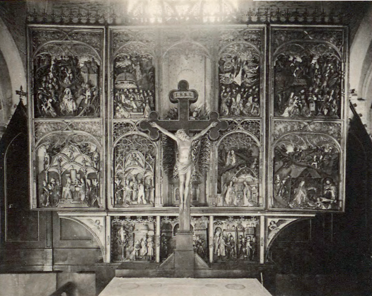 Hochaltarretabel (Hauptaltar) der Marienkirche in Anklam. Geöffnet 7,20m breit und 5,60m hoch. Der Altar wurde im Krieg in das Schloß Schwerinsburg ausgelagert und ist dort beim Brand des Gutes 1945 zum großen Teil vermutlich vernichtet worden. Erhalten ist die lebensgroße Marienfigur mit Kind (hier vom Altarkruzifix verdeckt) welche sich heute in der Marienkapelle von St. Marien befindet.